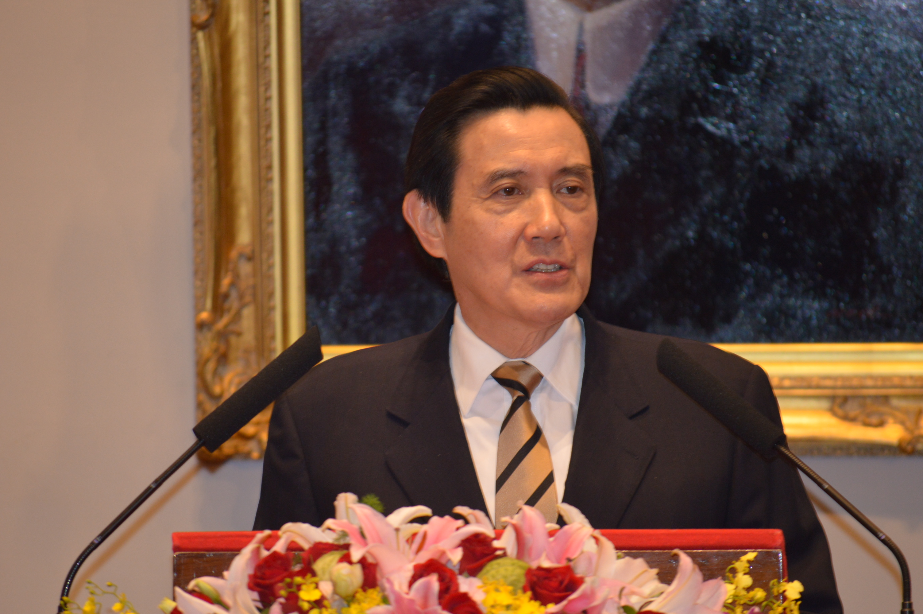 馬英九總統3月23日召開中外記者會。